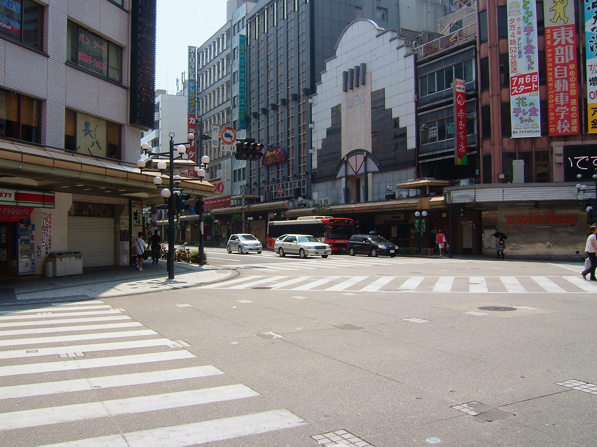 石川県金沢市にある片町交差点。北陸地方を代表する繁華街である片町の象徴となっている。